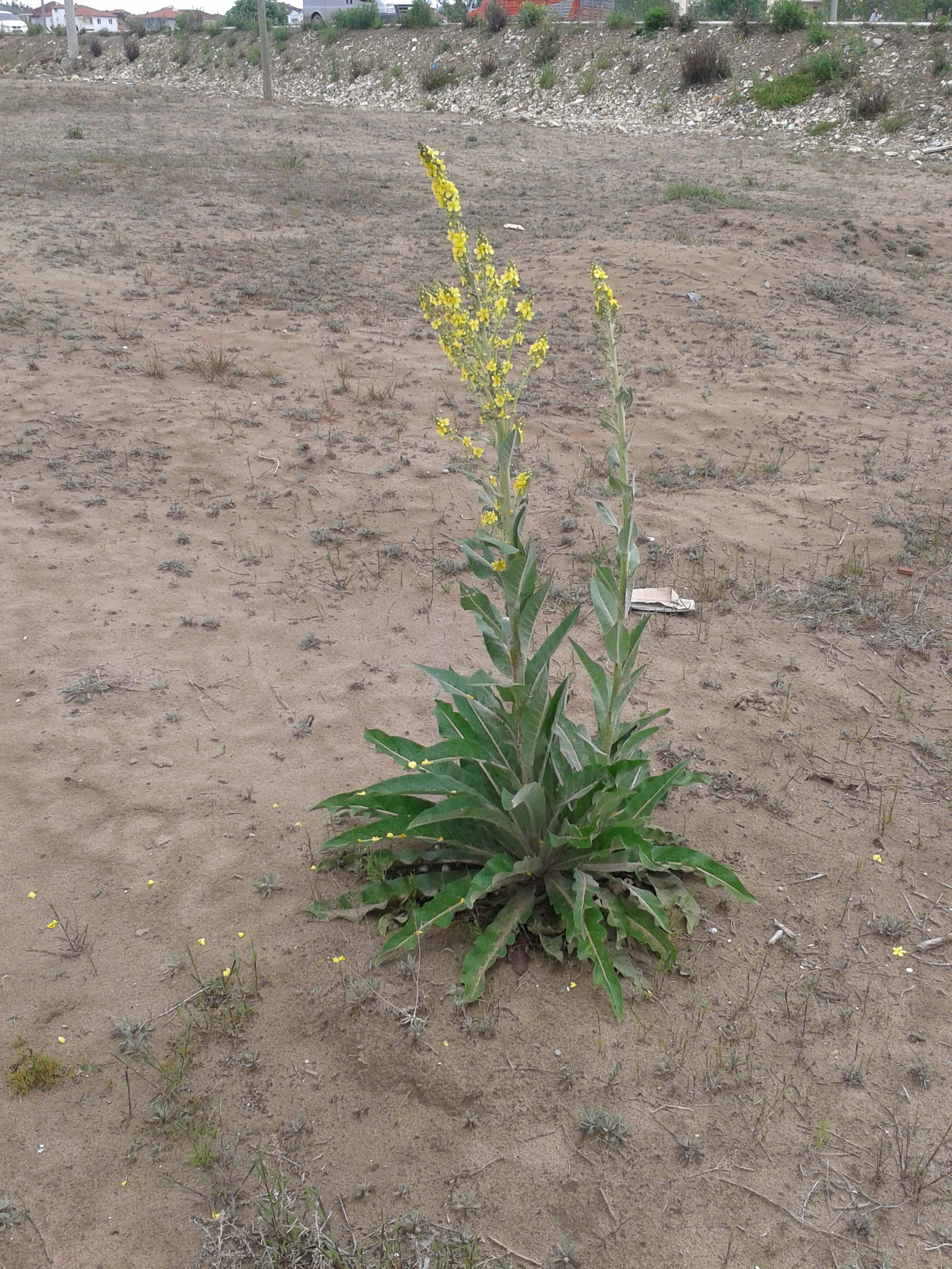 Sahil sığırkuyruğu; İstanbul, Sakarya, Kocaeli illerinde sahildeki kumullar üzerinde yayılır. Nesli küresel ölçekte tehdit altında olan bir türdür. Resim Karasu kumullarında çekildi.